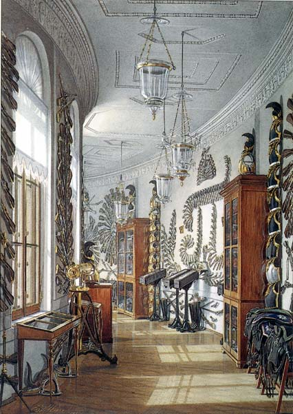 Арсенальная галерея в Большом Гатчинском дворце